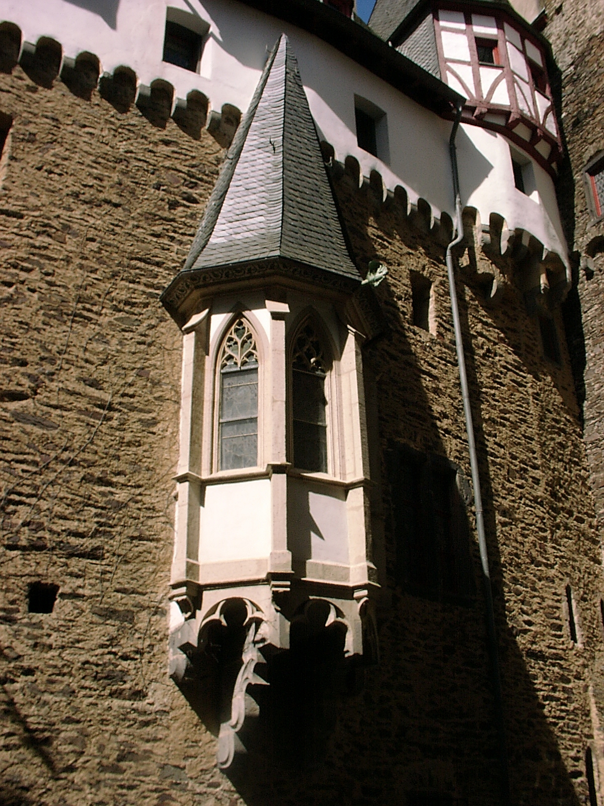 Erker an der Burg Eltz / Bay window at Burg Eltz